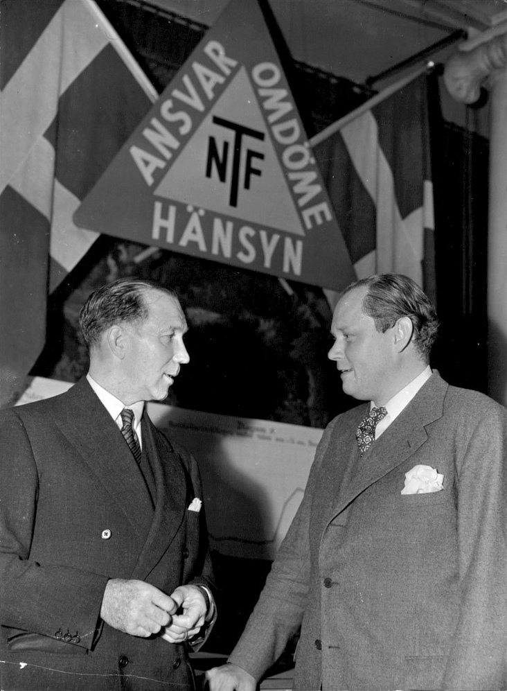 NTF:s möte.